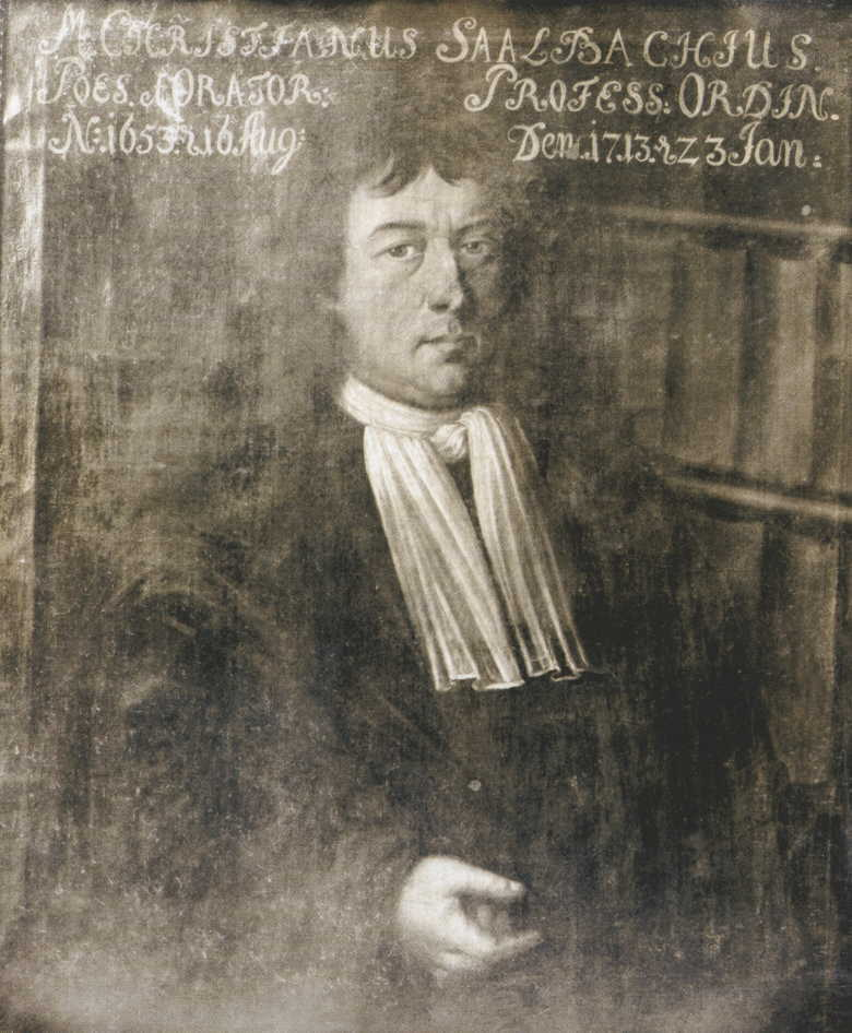 Bildnis von Christian Saalbach (1653–1713)